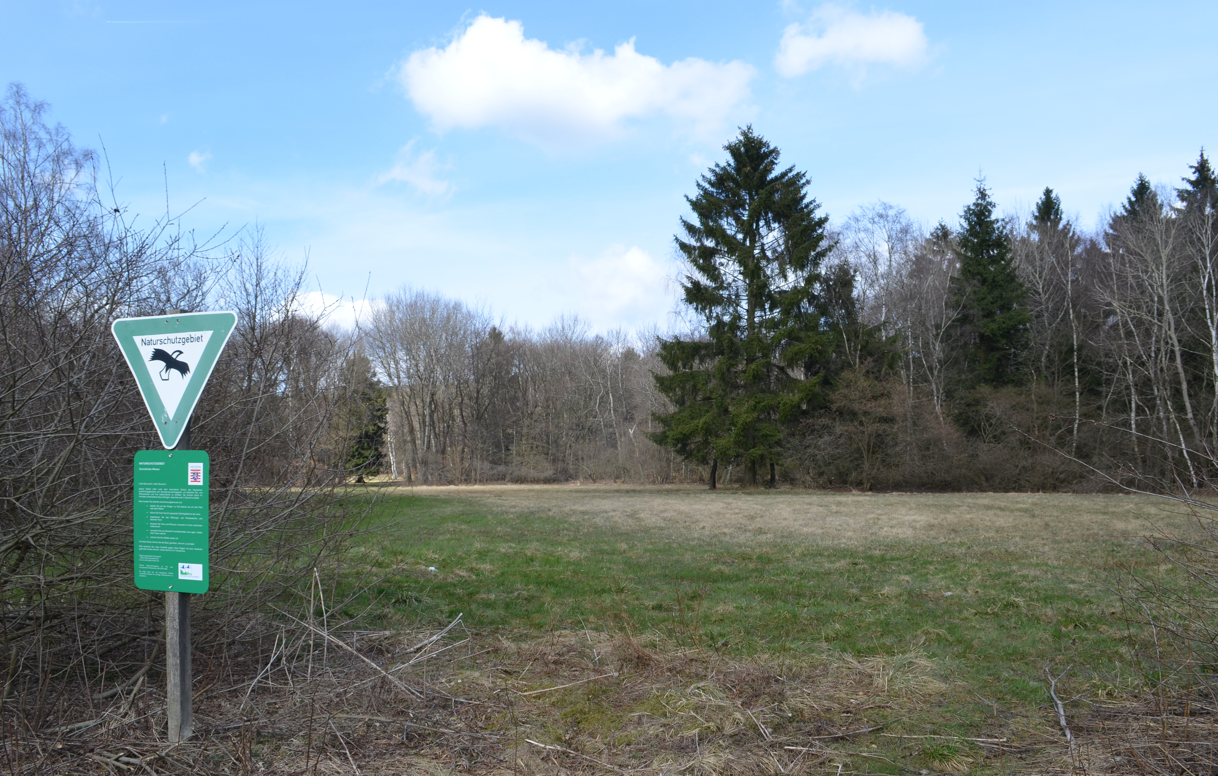 Königstein, NSG Schmittröder Wiesen